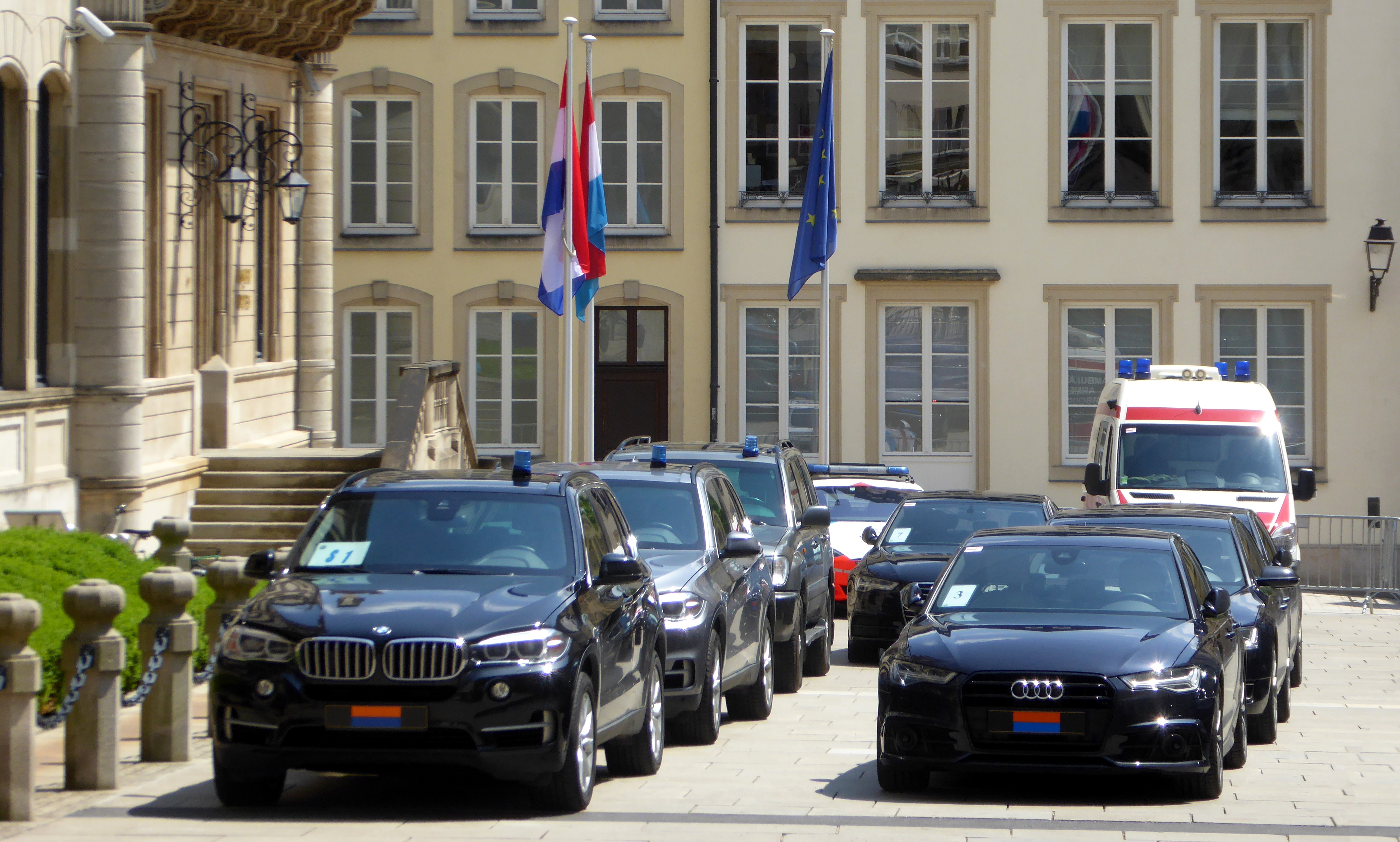 Luxemburg (LU), anlässlich des Staatsbesuchs des niederländischen Königs Willem-Alexander am 2018-05-23 steht der Krautmarkt vor dem großherzoglichen Palast voller Staatskarossen.